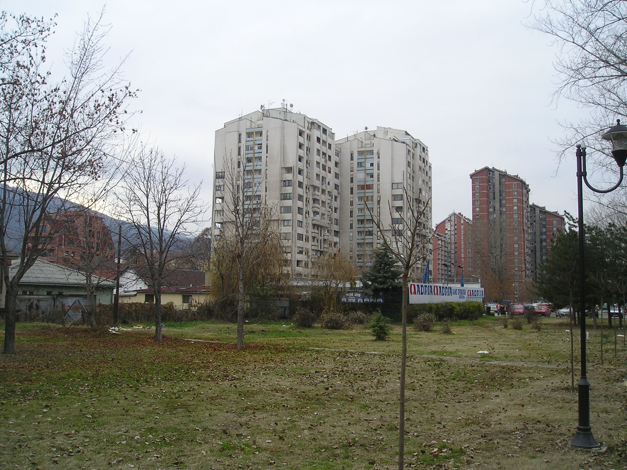 Поглед на Капиштец од исток